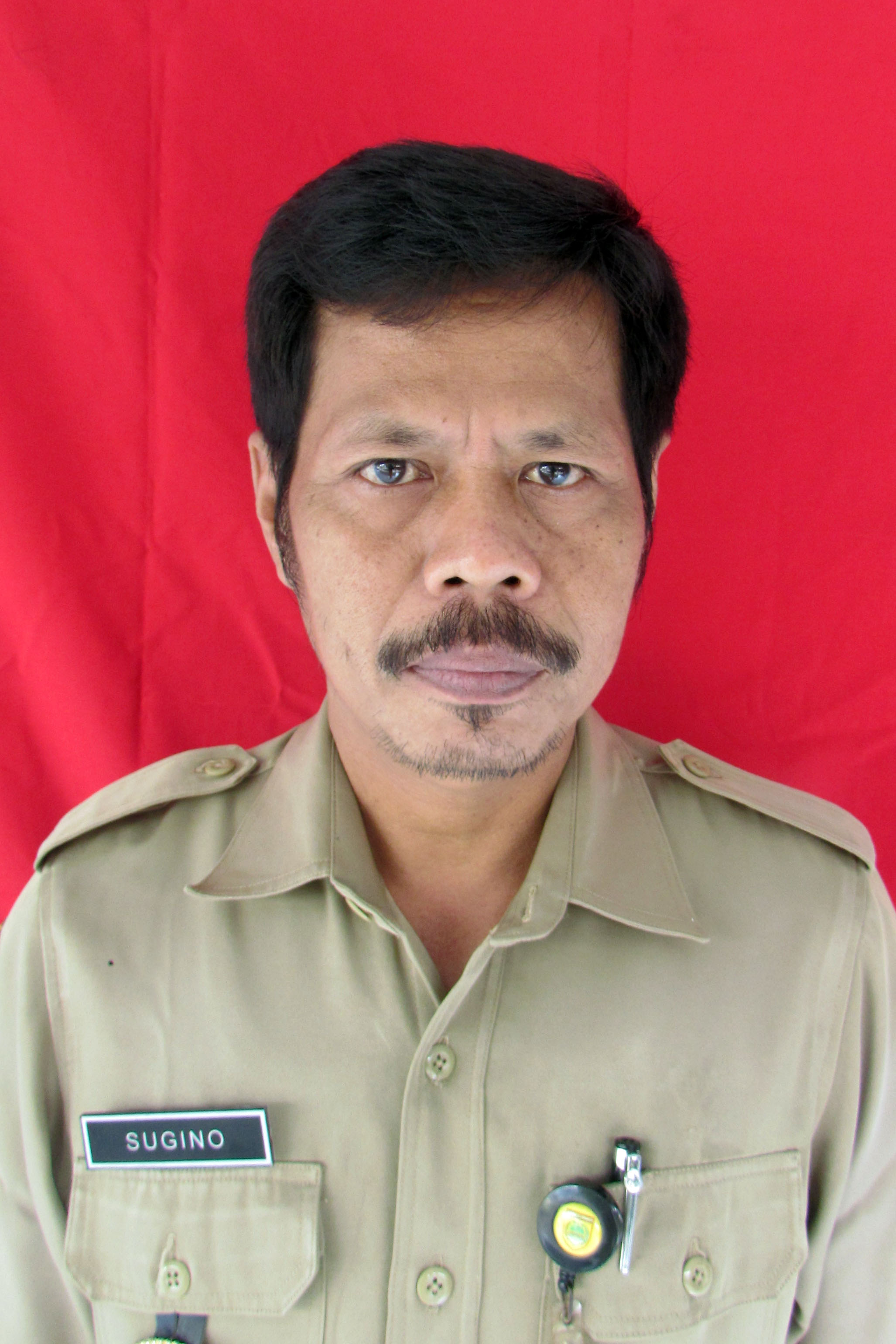 lurahe